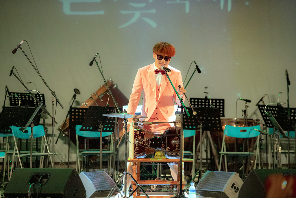 장구의신 박서진